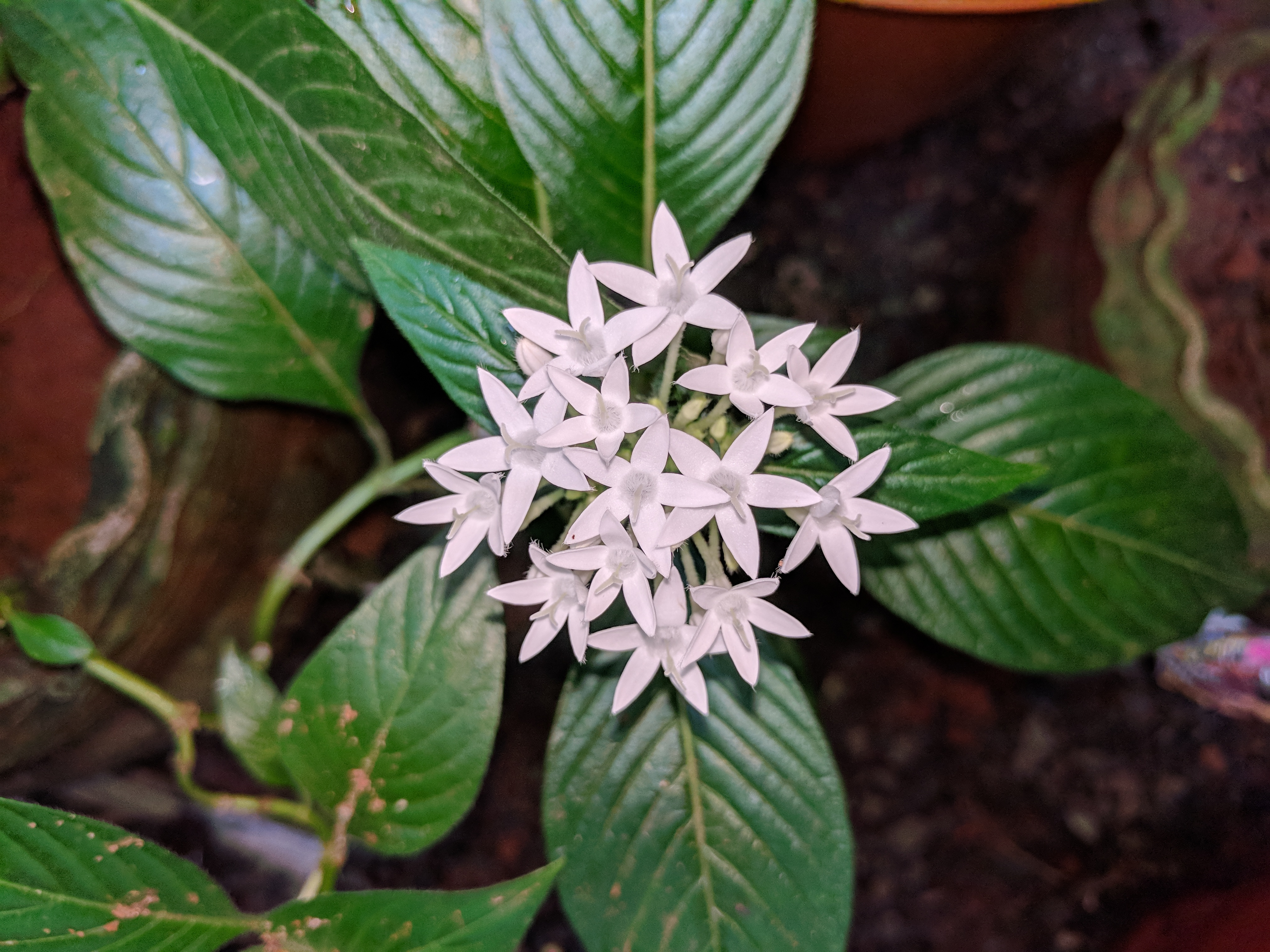 Pentas lanceolata